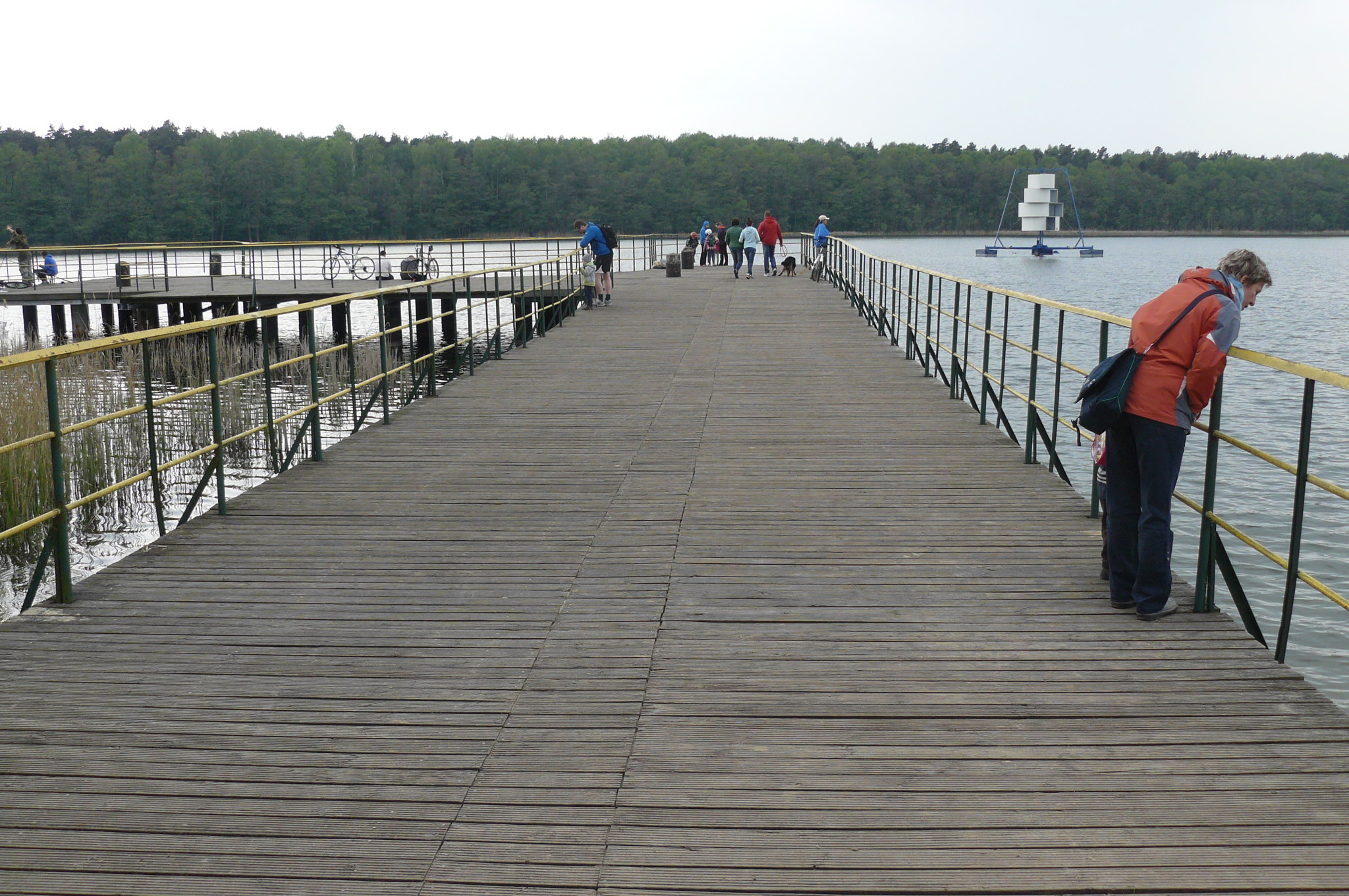 Poznań, jez. Strzeszyńskie w Strzeszynku.